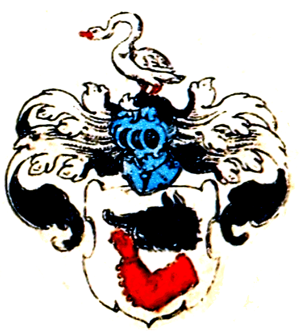 Wappen derer von Danwitz